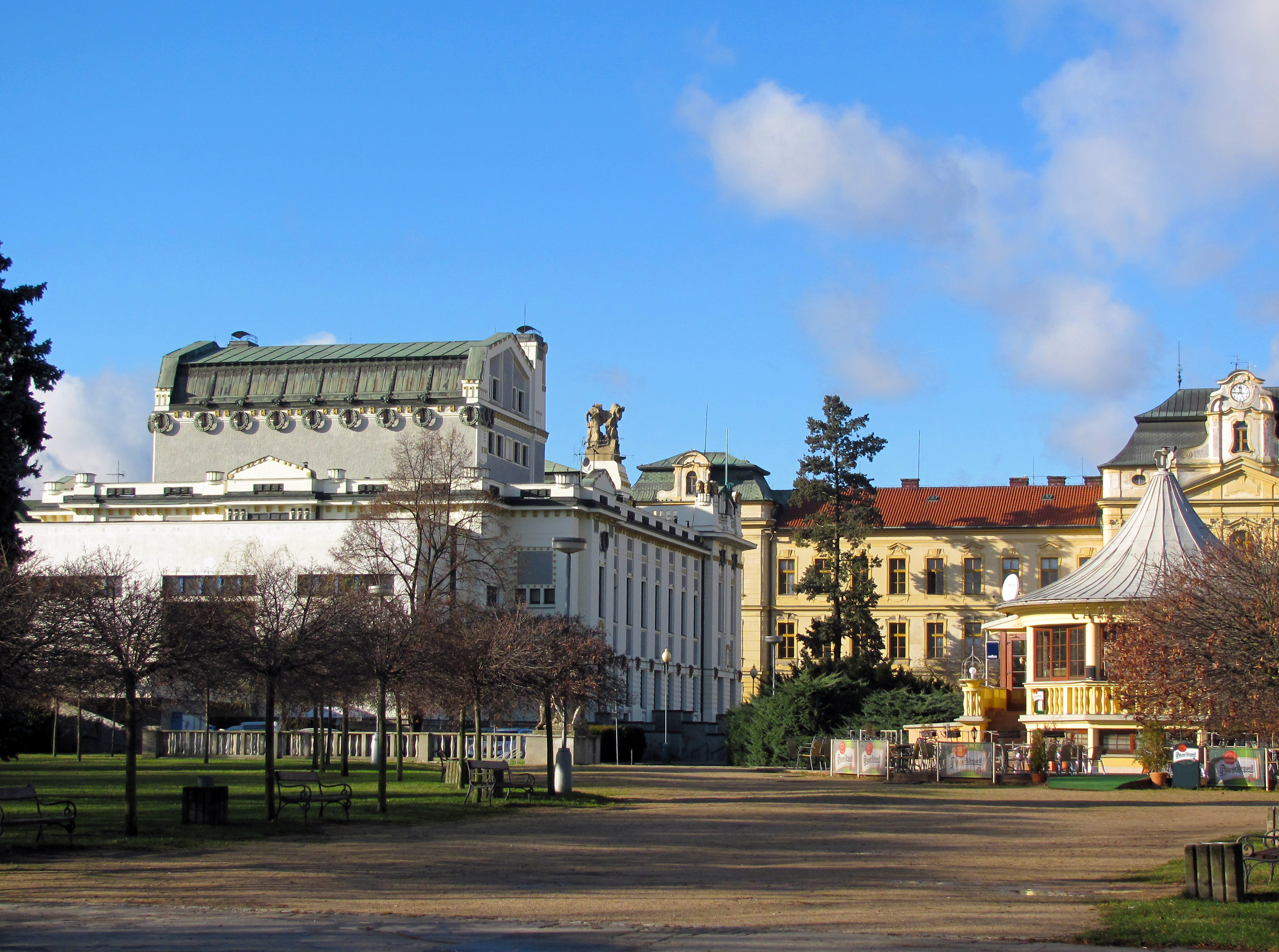 Pohled na budovu Městského divadla Mladá Boleslav, někdejší hudební pavilon a budovu Gymnázia Dr. Josefa Pekaře z parku Výstaviště